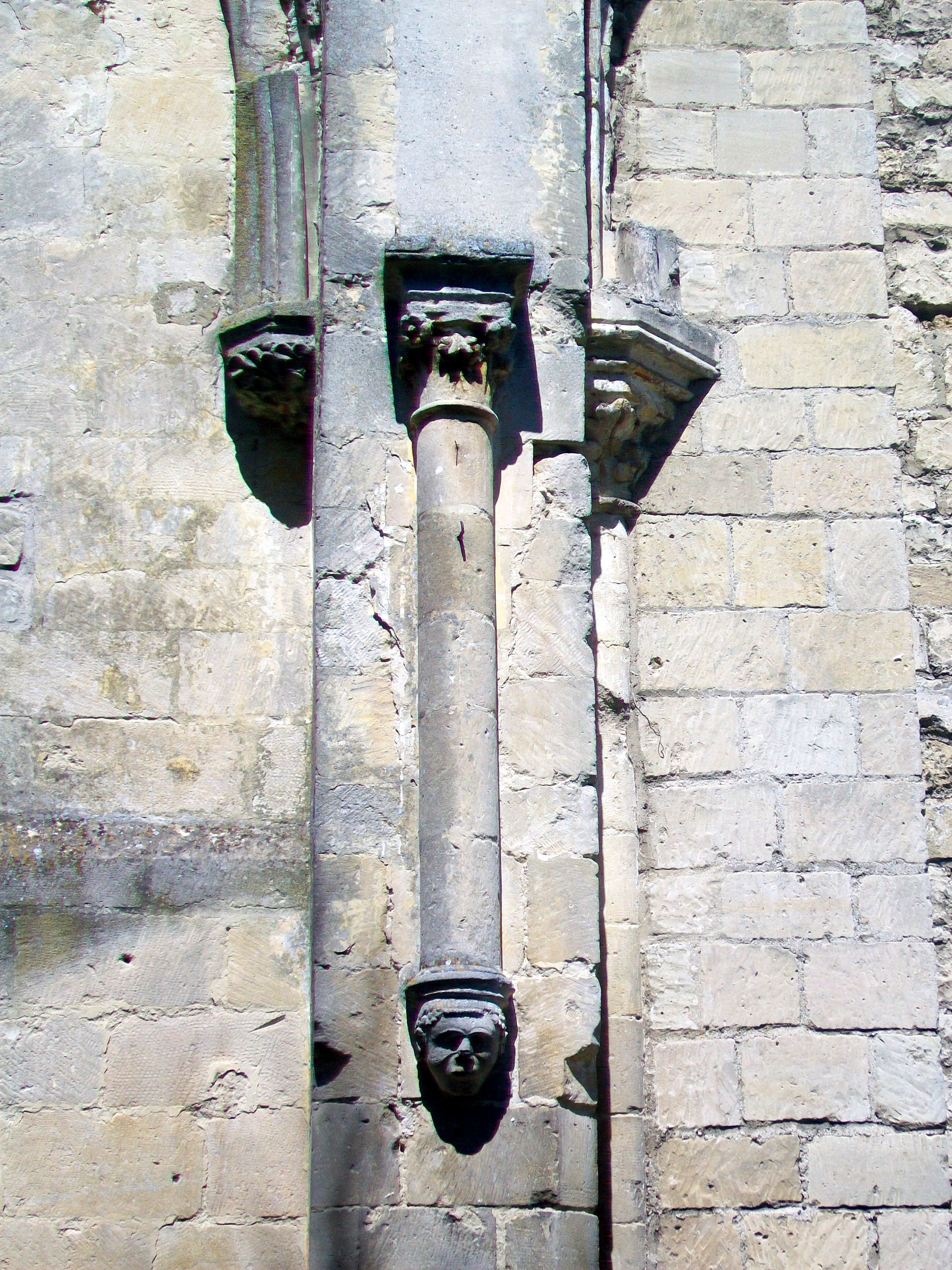 Colonne engagée, chpaiteaux et console, entre le transept sud (à gauche) et la grande chapelle latérale du chœur (à droite).